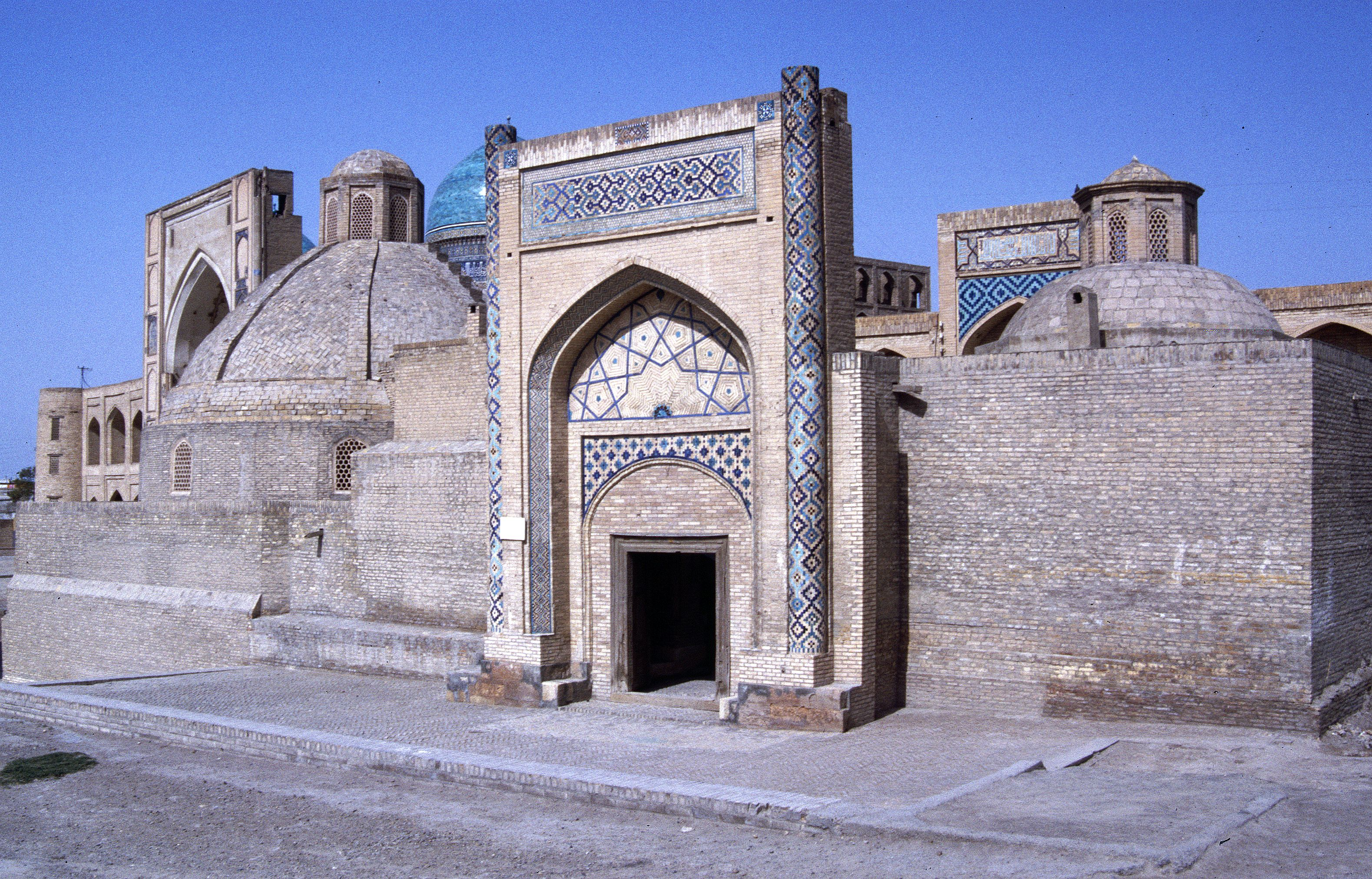 Kaljan-Komplex